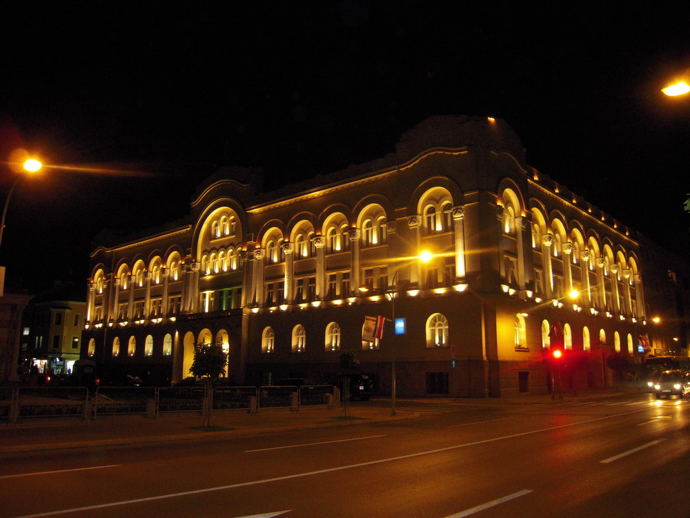 Gradska_palata-Banja_Luka